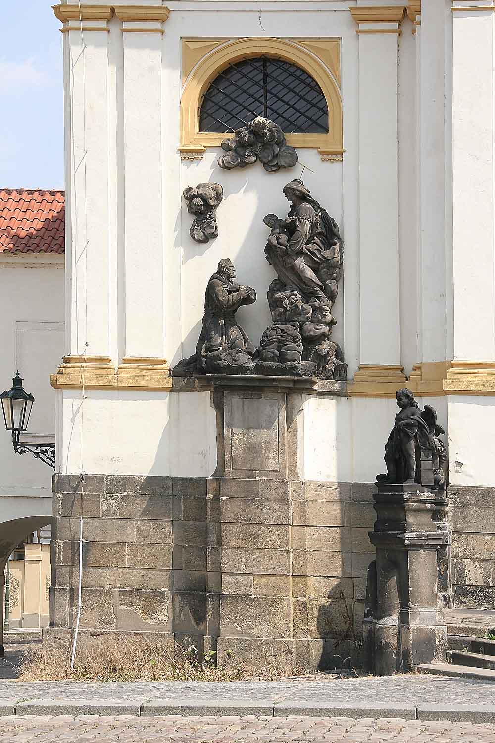 Beschreibung: Loreto auf dem Hradschin, Loretoplatz in Prag, Statue autor:Prazak date: 27. 7. 2006